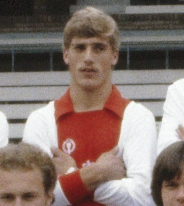 Collectie / Archief : Fotocollectie Anefo Reportage / Serie : [ onbekend ] Beschrijving : Presentatie Ajax selectie 1979/1980 ; selectie Ajax Datum : 1979 Trefwoorden : selecties, sport, voetbal Instellingsnaam : AJAX Fotograaf : Dijk, Hans van / Anefo Auteursrechthebbende : Nationaal Archief Materiaalsoort : Dia (kleur) Nummer archiefinventaris : bekijk toegang 2.24.01.06 Bestanddeelnummer : 253-8064